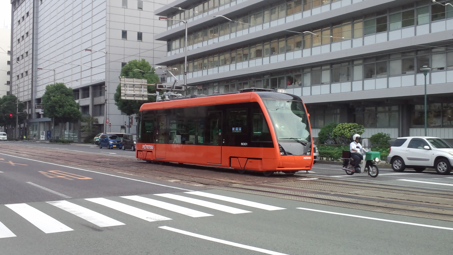 試運転中のモハ5000形5001号